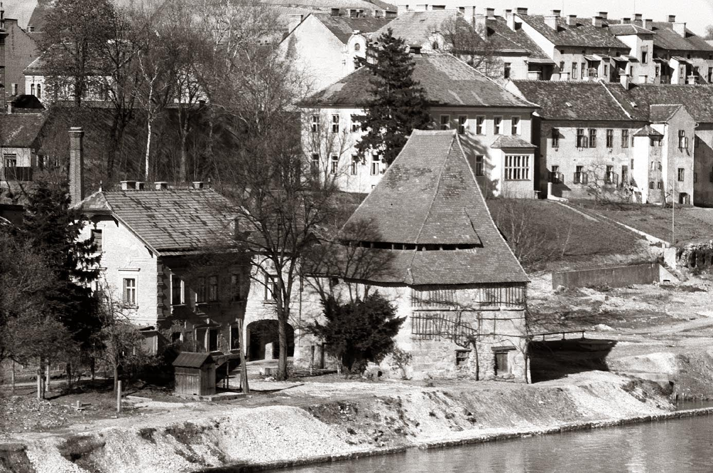 Vodni stolp v Mariboru, v ozadju zobna ambulanta, ob Dravi pa je viden del regulacijskega obrežja.